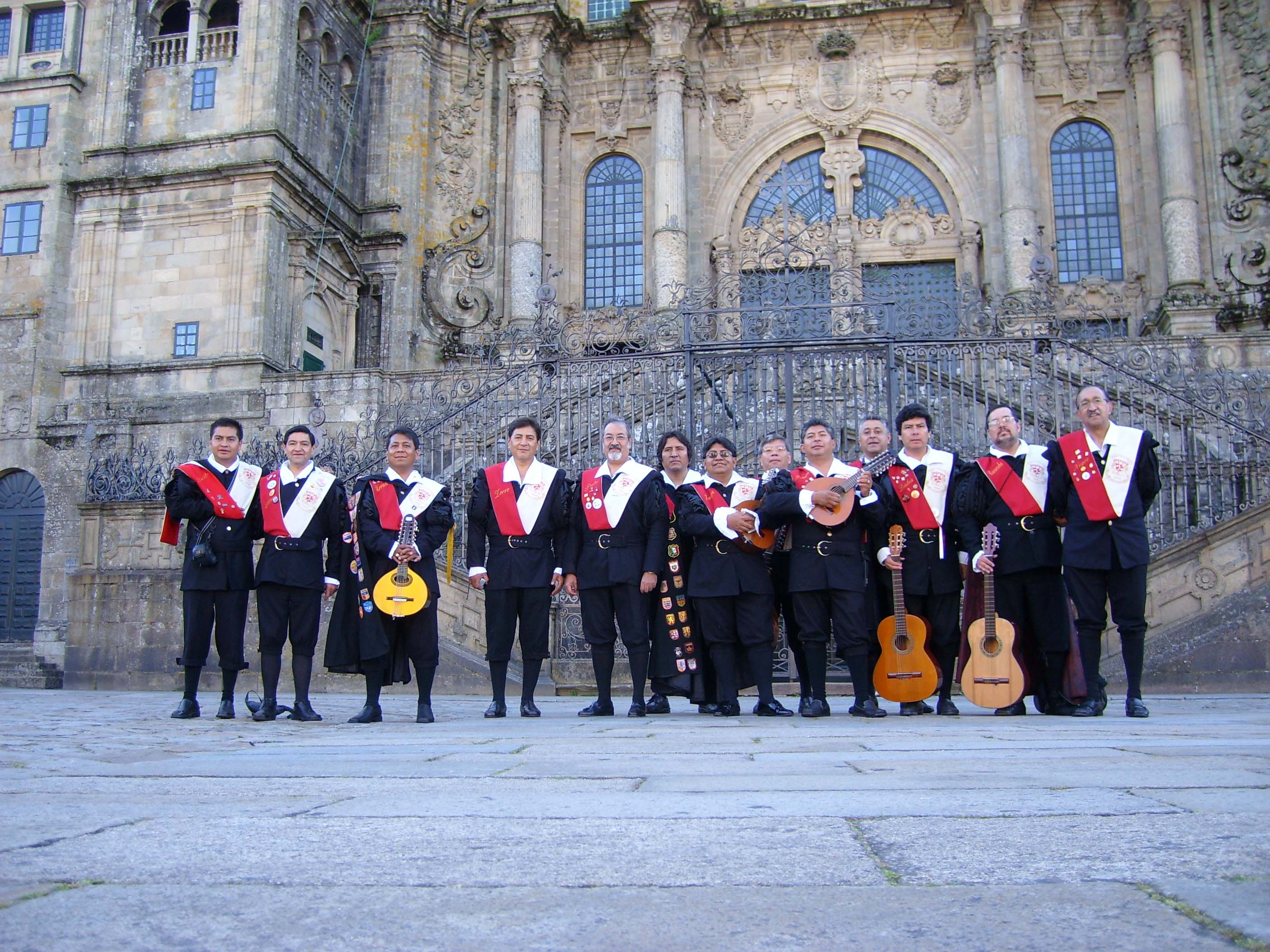 Fotografia hecha en Santiago de Compostela, España, durante la gira realizada por la Paleotuna en Junio de 2006.